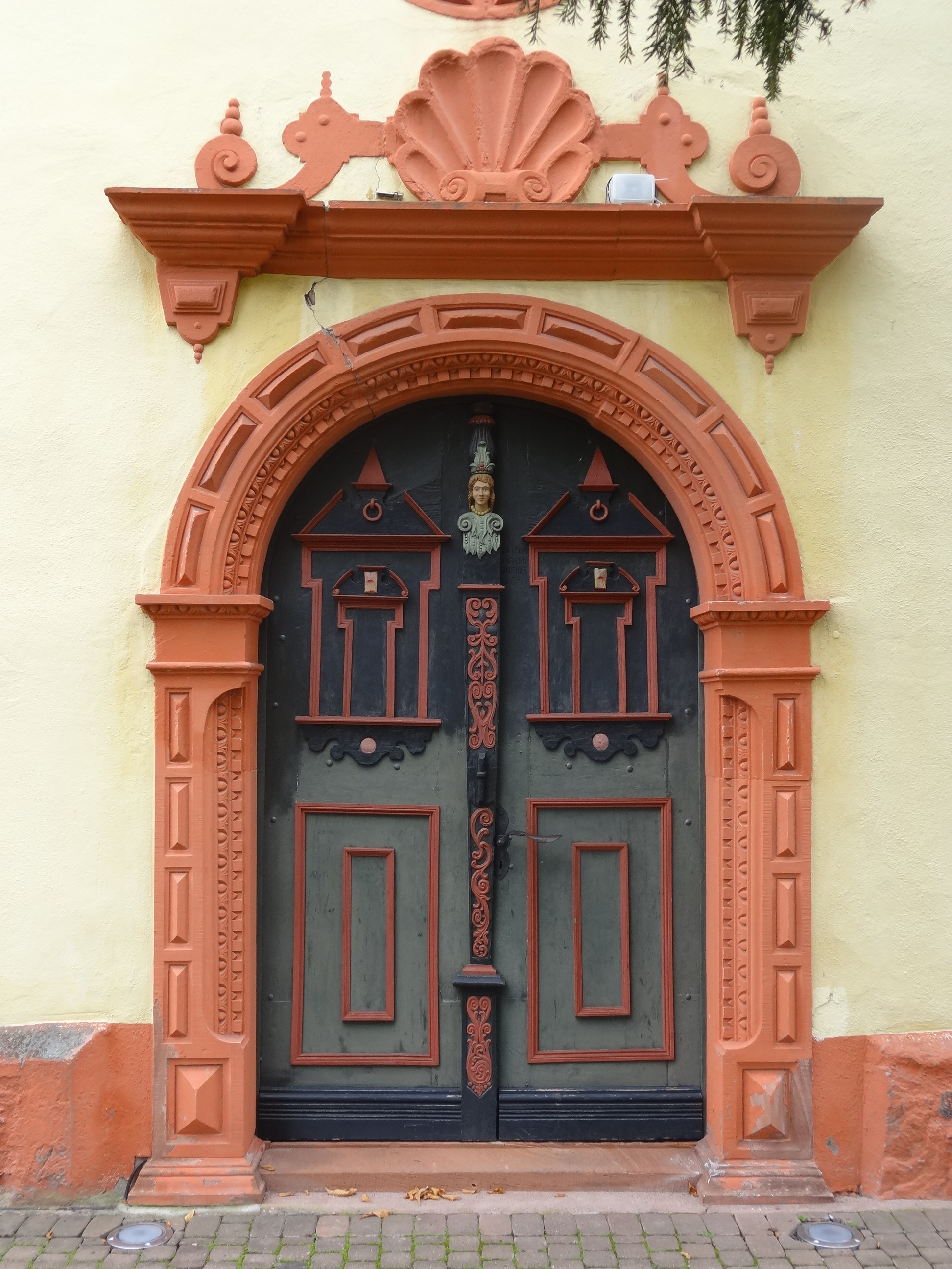 Stadtkirche zum Heiligen Geist (Nidda)